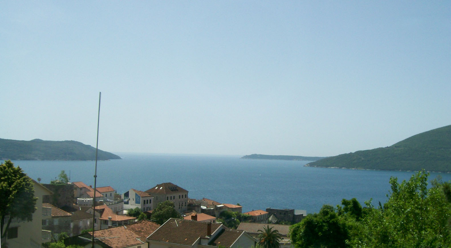 Pogled iz Herceg Novog na ulaz u zaljev Boka kotorska i poluotok Prevlaka (RH)